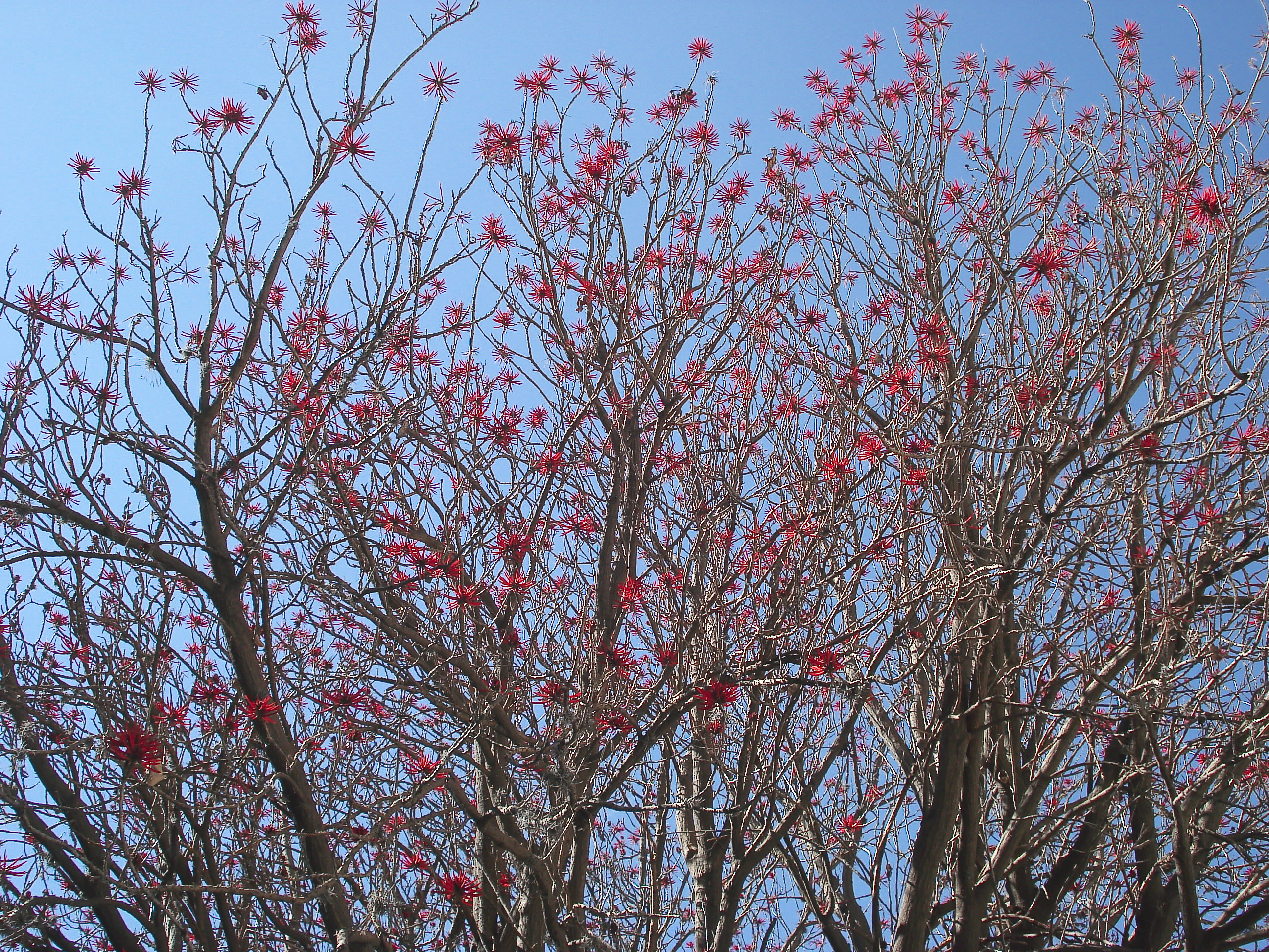 Colorin